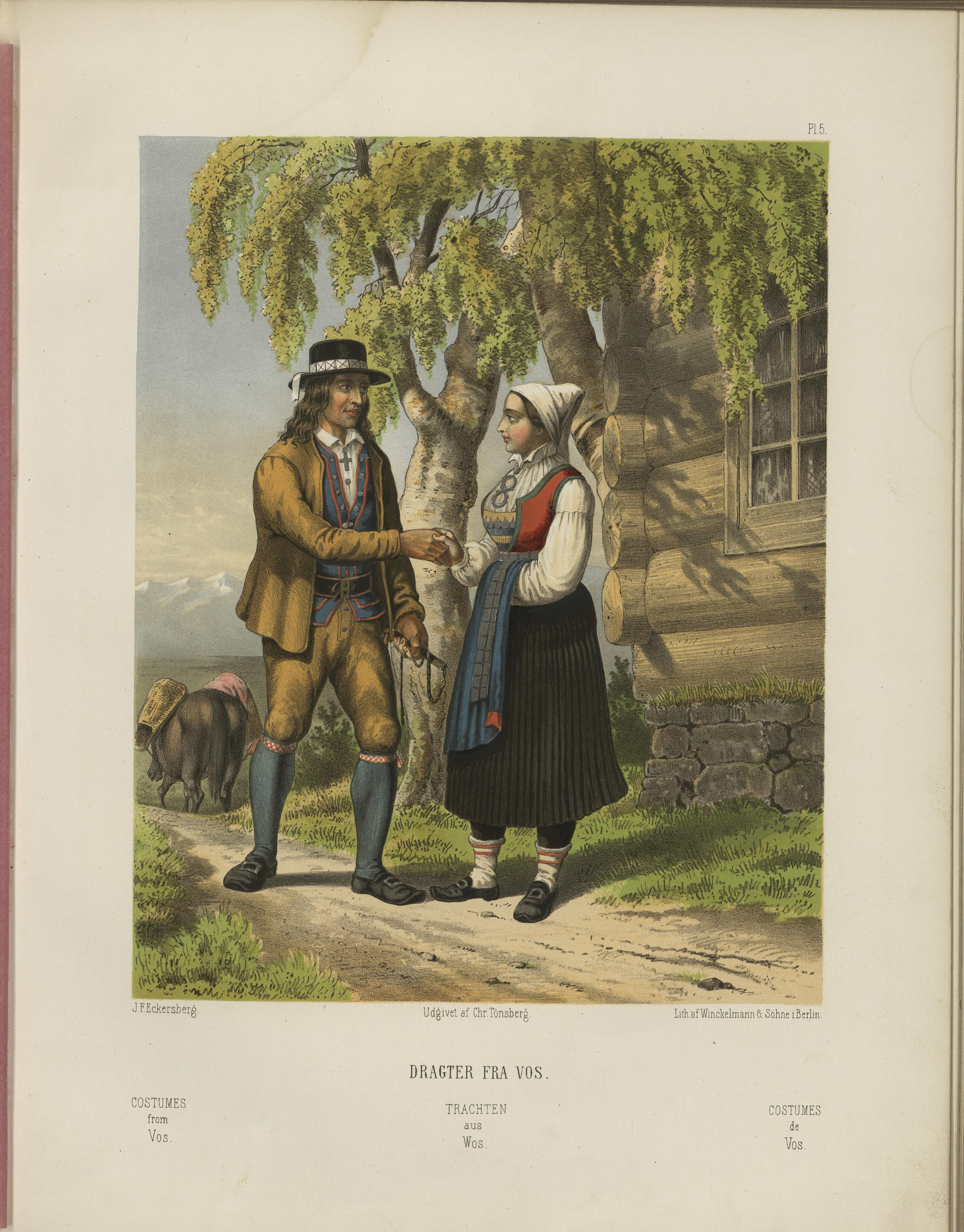 Illustrasjon hentet fra boken "Udvalgte norske Nationaldragter" av ukjent forfatter og utgitt av Chr. Tønsberg (no, [1861])